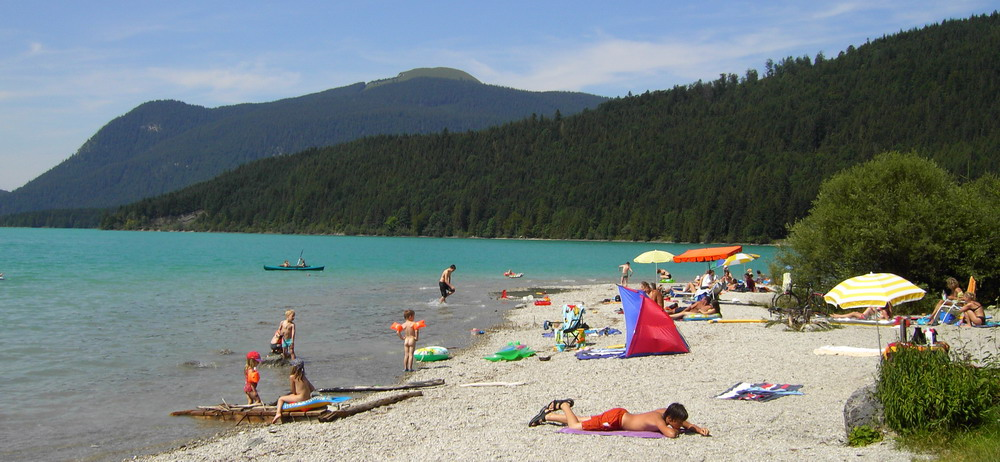 Walchenseesüduferstrand mit dem Jochberg im Hintergrund